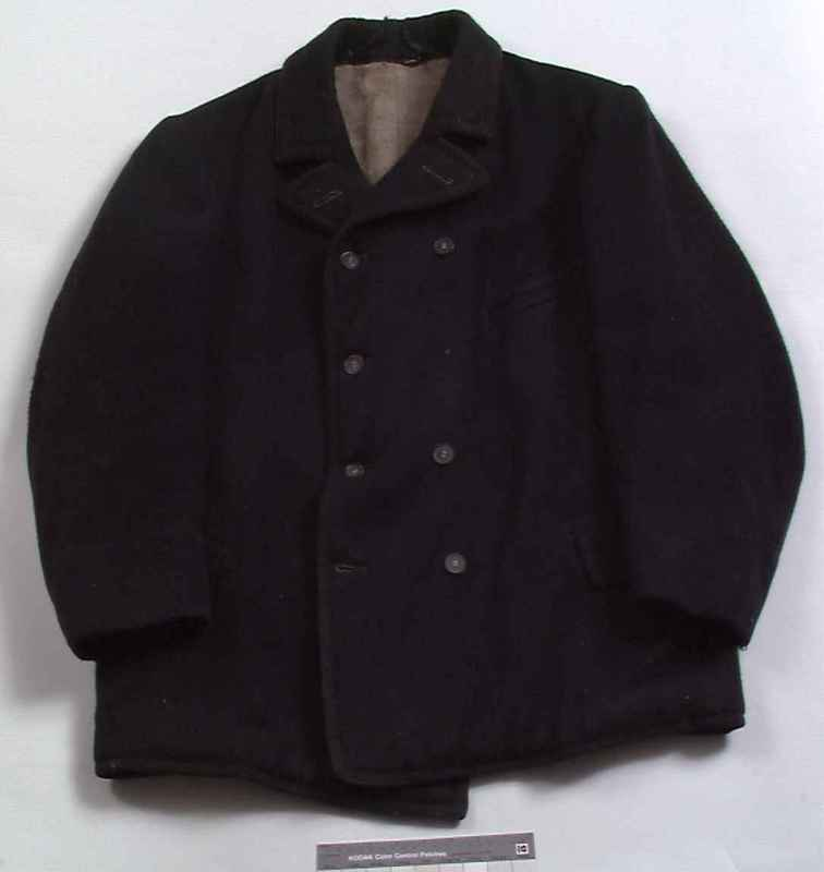 Dette plagget befinner seg i Norsk Folkemuseums samlinger. Museet har lagt det inn på og oppgir at det er en stortrøye/pjekkert/trøye som stammer fra Meløy i Nordland og er tilvirket ca. 1902 eller 1903.